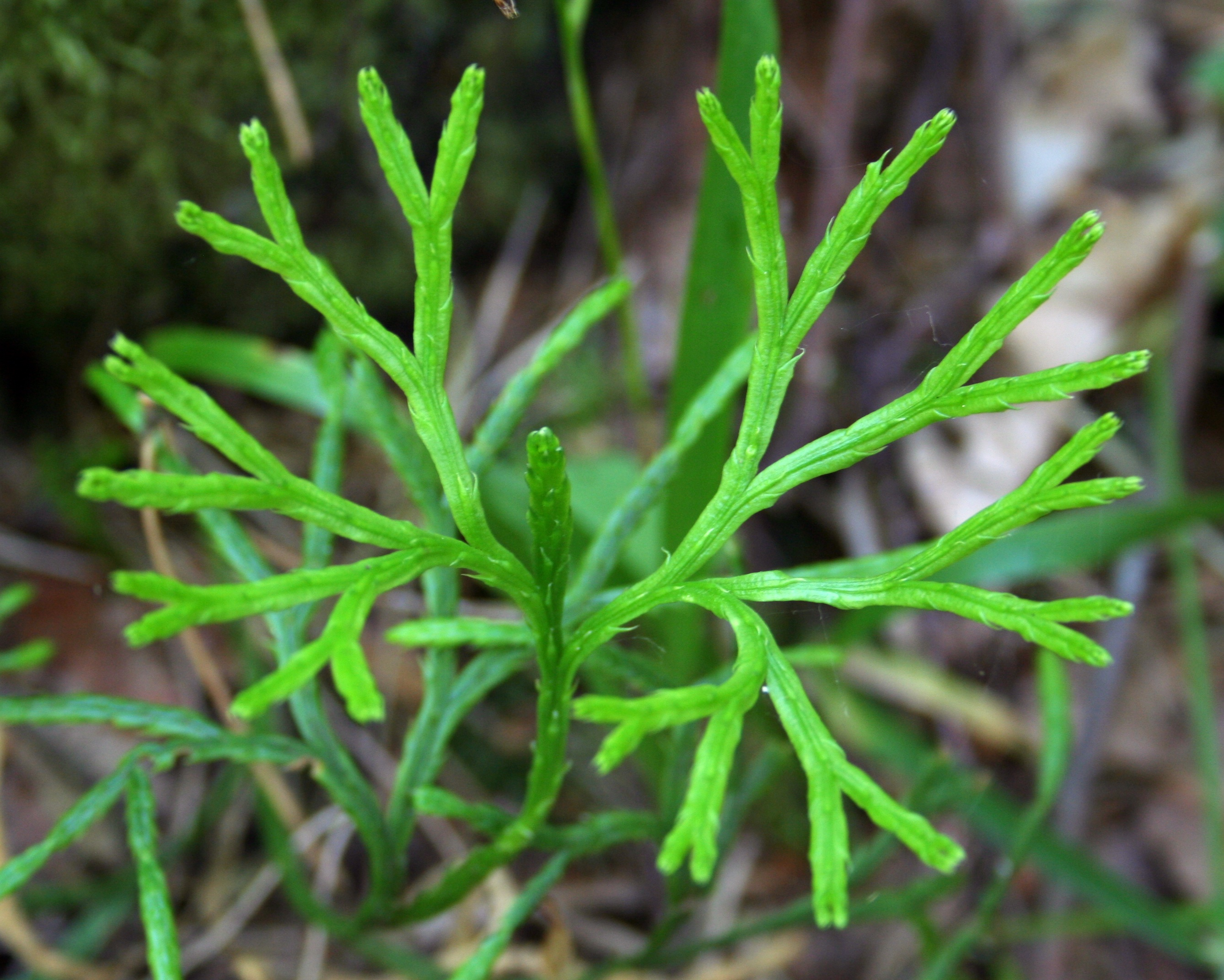 Widłak spłaszczony w Parku Narodowym Bory Tucholskie